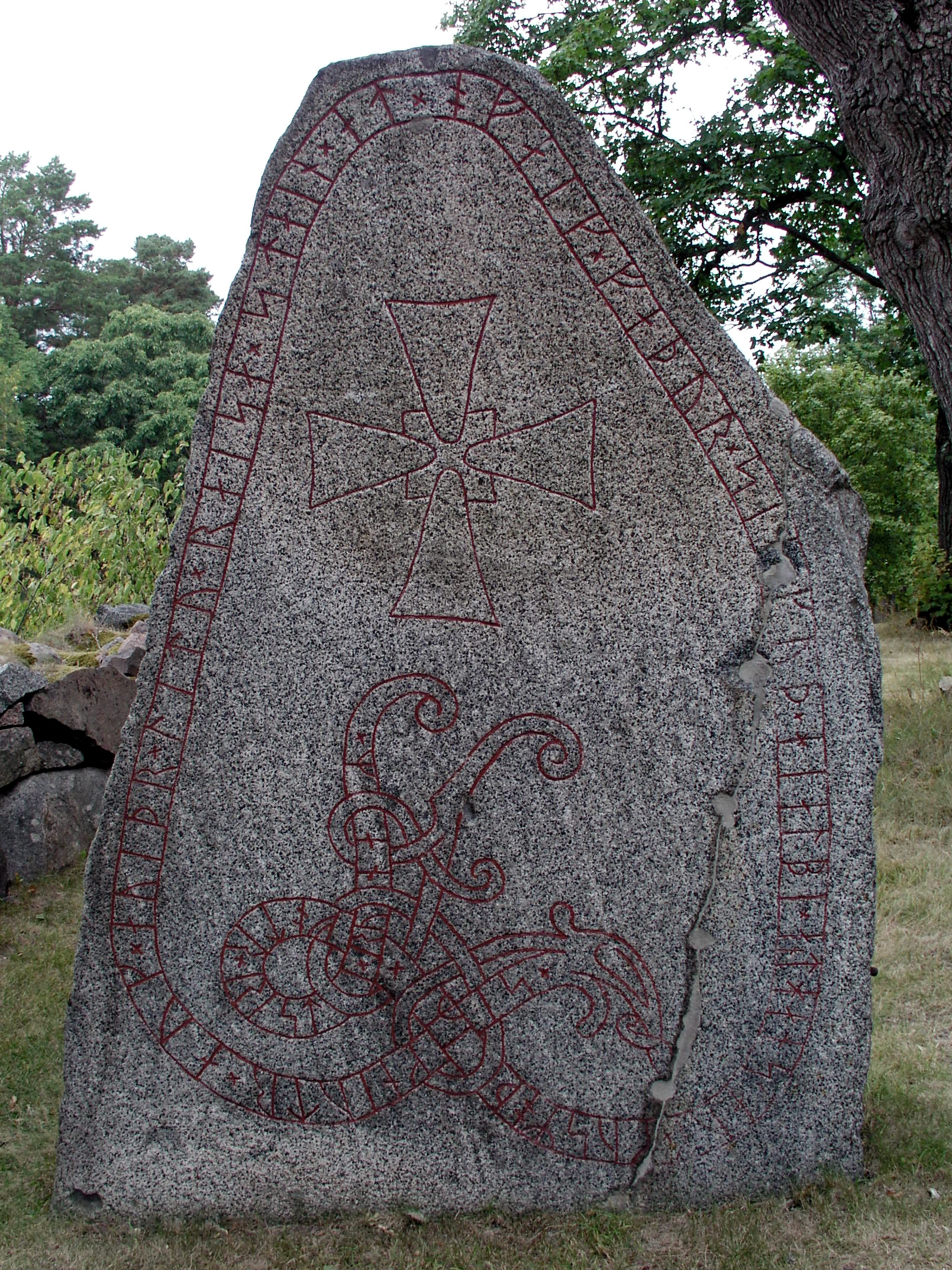 U 945, Upplands runinskrifter. Placerad utanför Danmarks kyrka